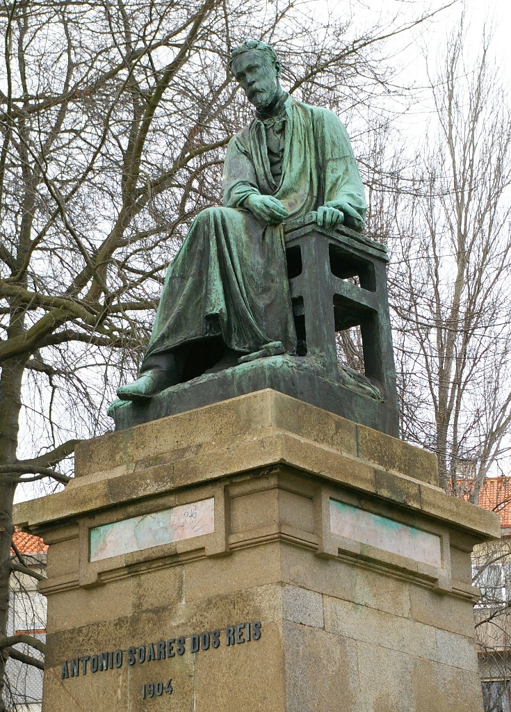 "Soares dos Reis" statue by Teixeira Lopes, at Vila Nova de Gaia, Portugal.